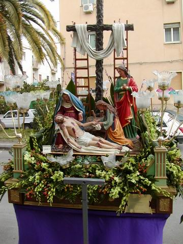 La pietà, dei "Piccoli Gruppi Sacri", detti Varicedde, a Caltanissetta. Realizzata nel 1924 da Giuseppe Emma